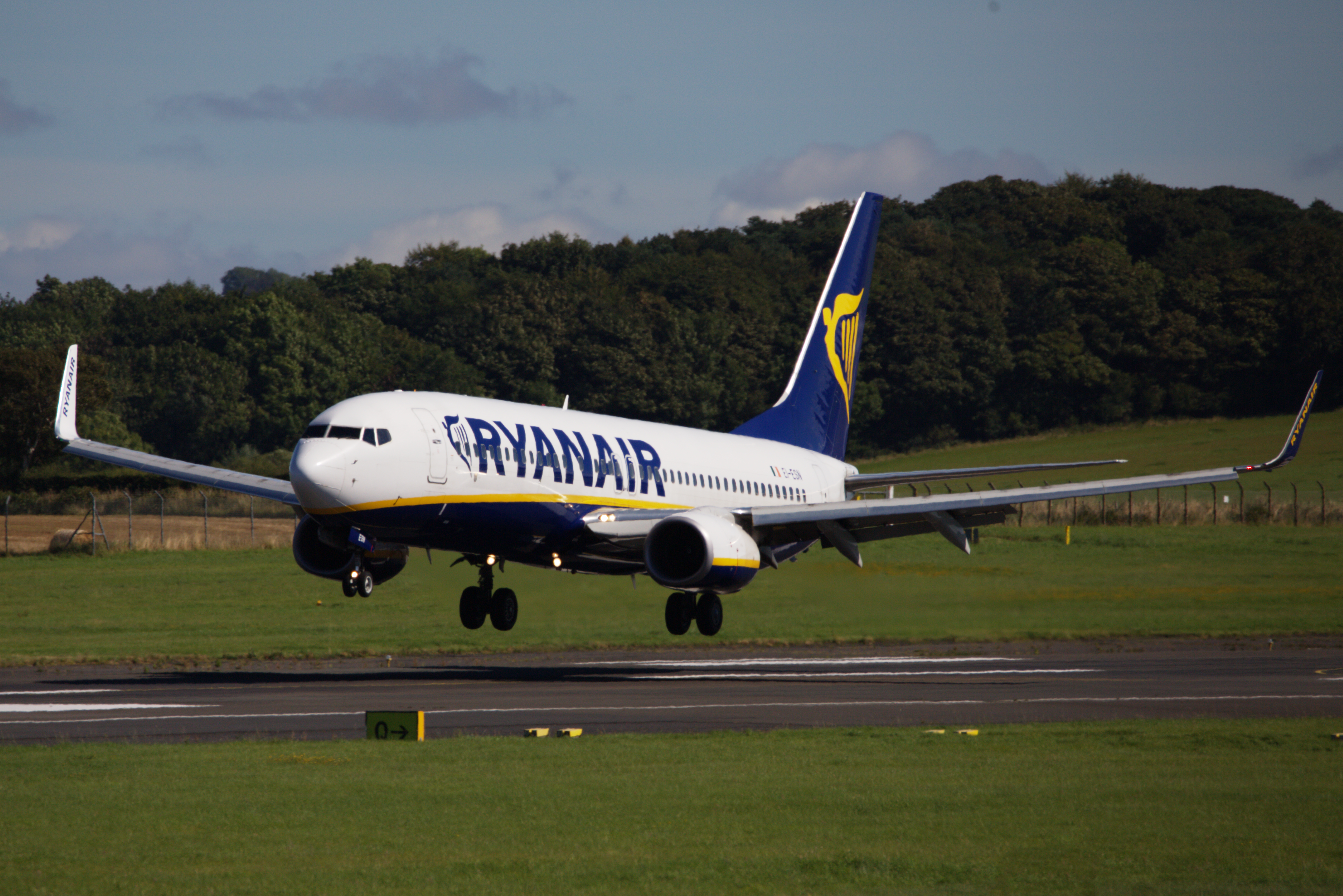 Boeing 737-8AS EI-EBR 1